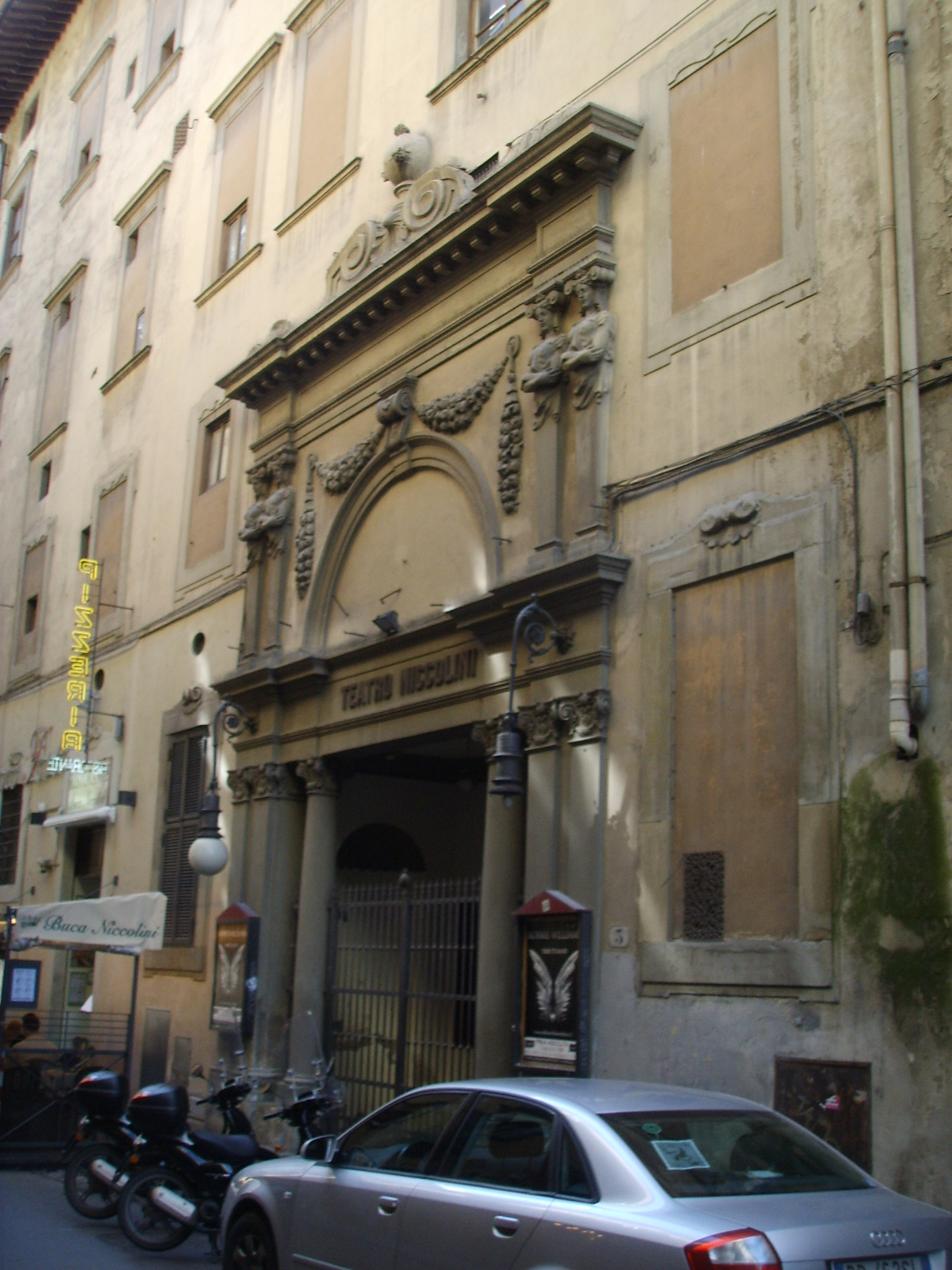 Teatro niccolini